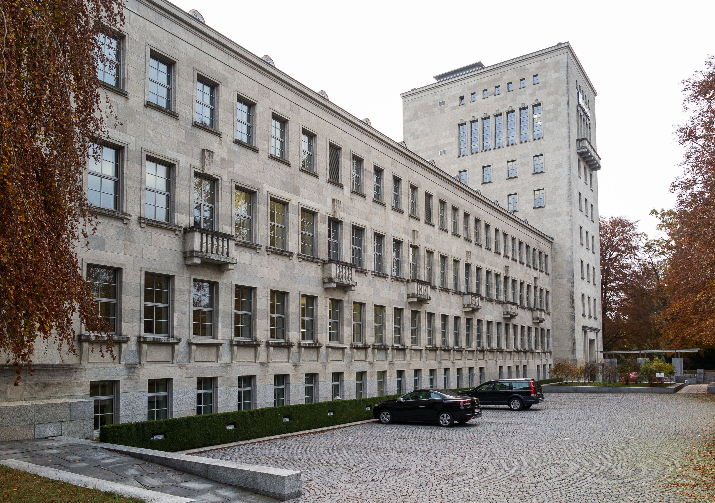 Bürogebäude/Firmensitz der AXA Winterthur (AXA Versicherungen AG / AXA Leben AG) an der General-Guisan Str. 40 in Winterthur